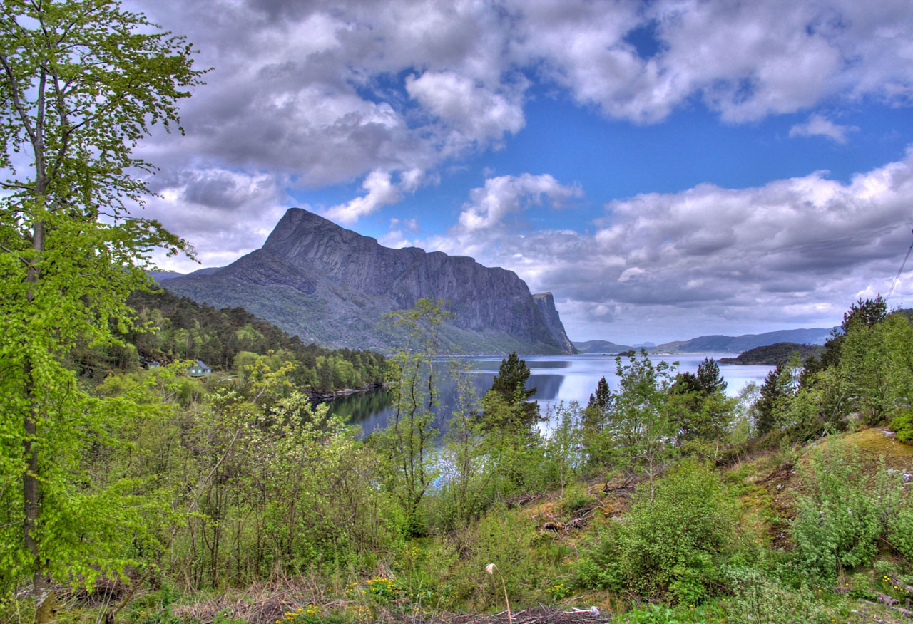 Lifjellet i Hyllestad HDR Photomatix